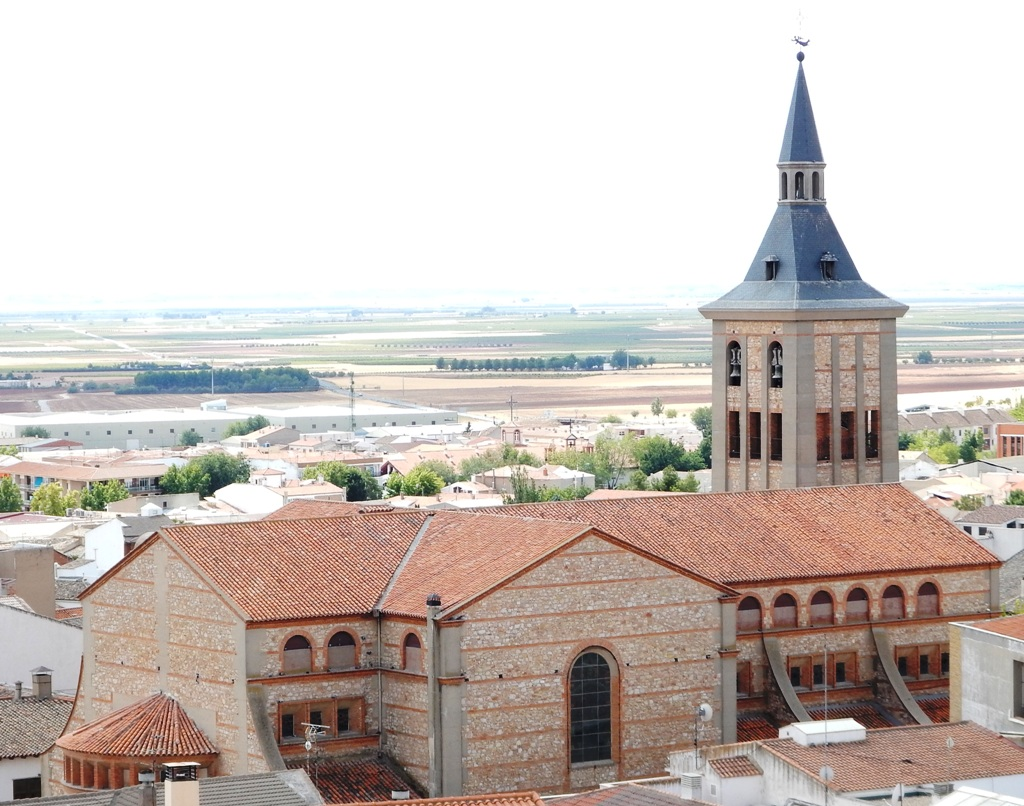 Iglesia parroquial de Campo de Criptana